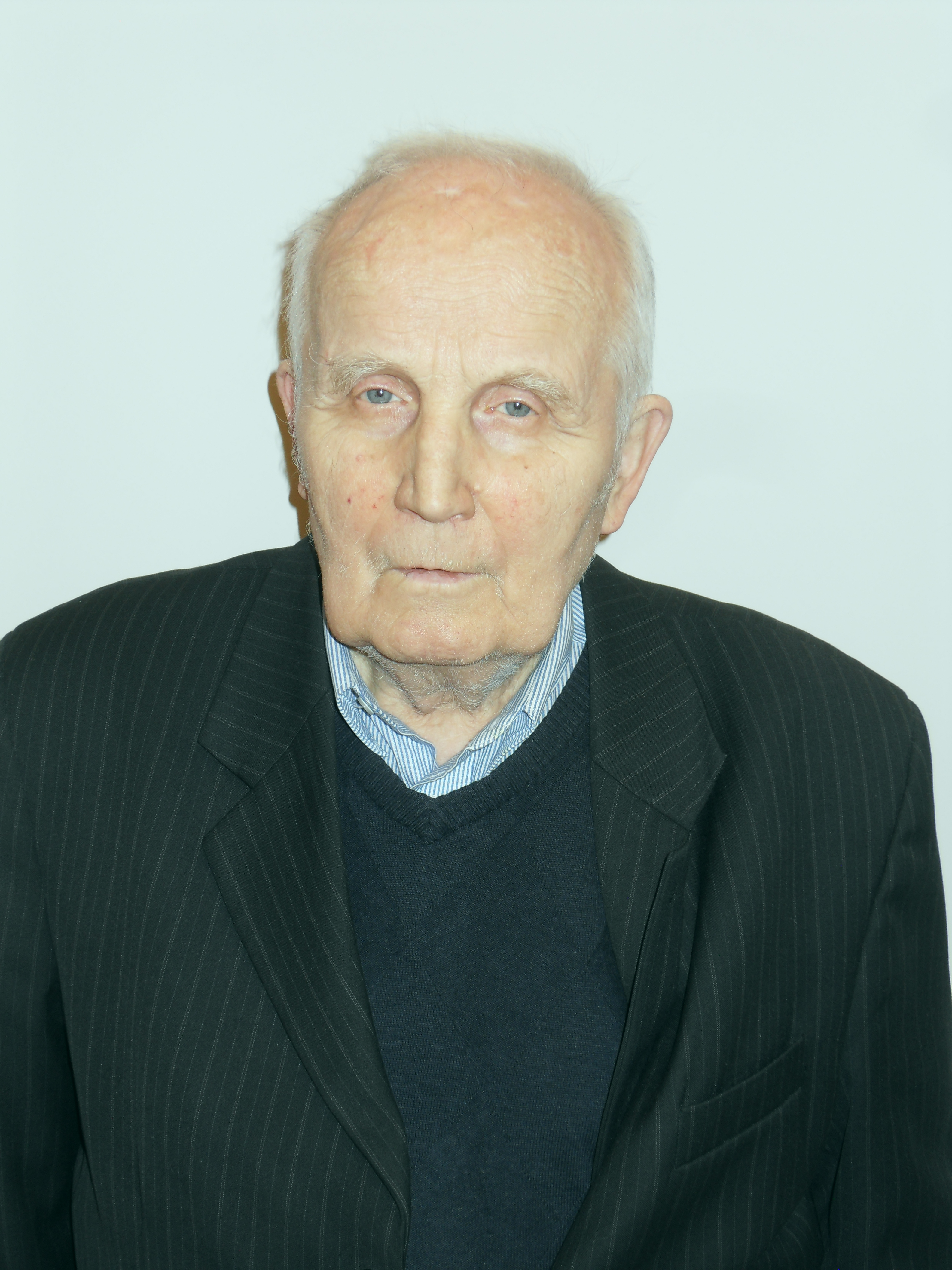 Pomorski profesor nauk humanistycznych Edward Breza.